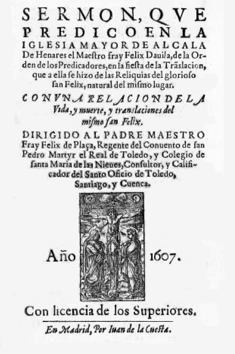 Portada del sermón de fray Félix Dávila contando la vida, muerte y traslado de las reliquias de San Félix de Alcalá a la Magistral de Alcalá de Henares, publicado en Madrid en 1607 por Juan de la Cuesta.